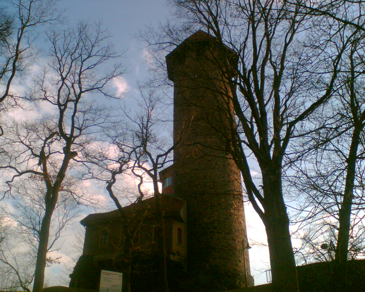 Schlossturm zu Auerbach